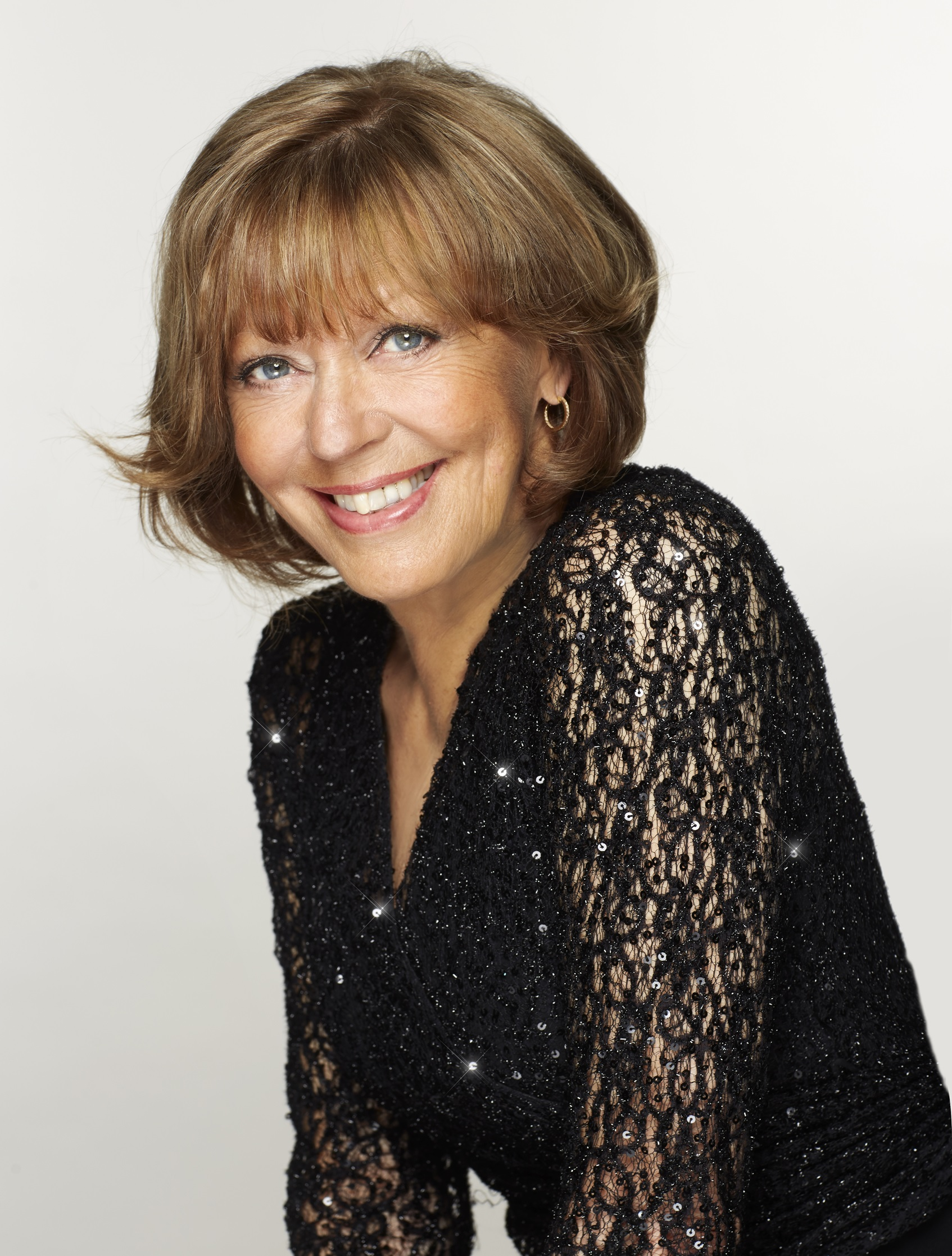 Artisten Lill Lindfors